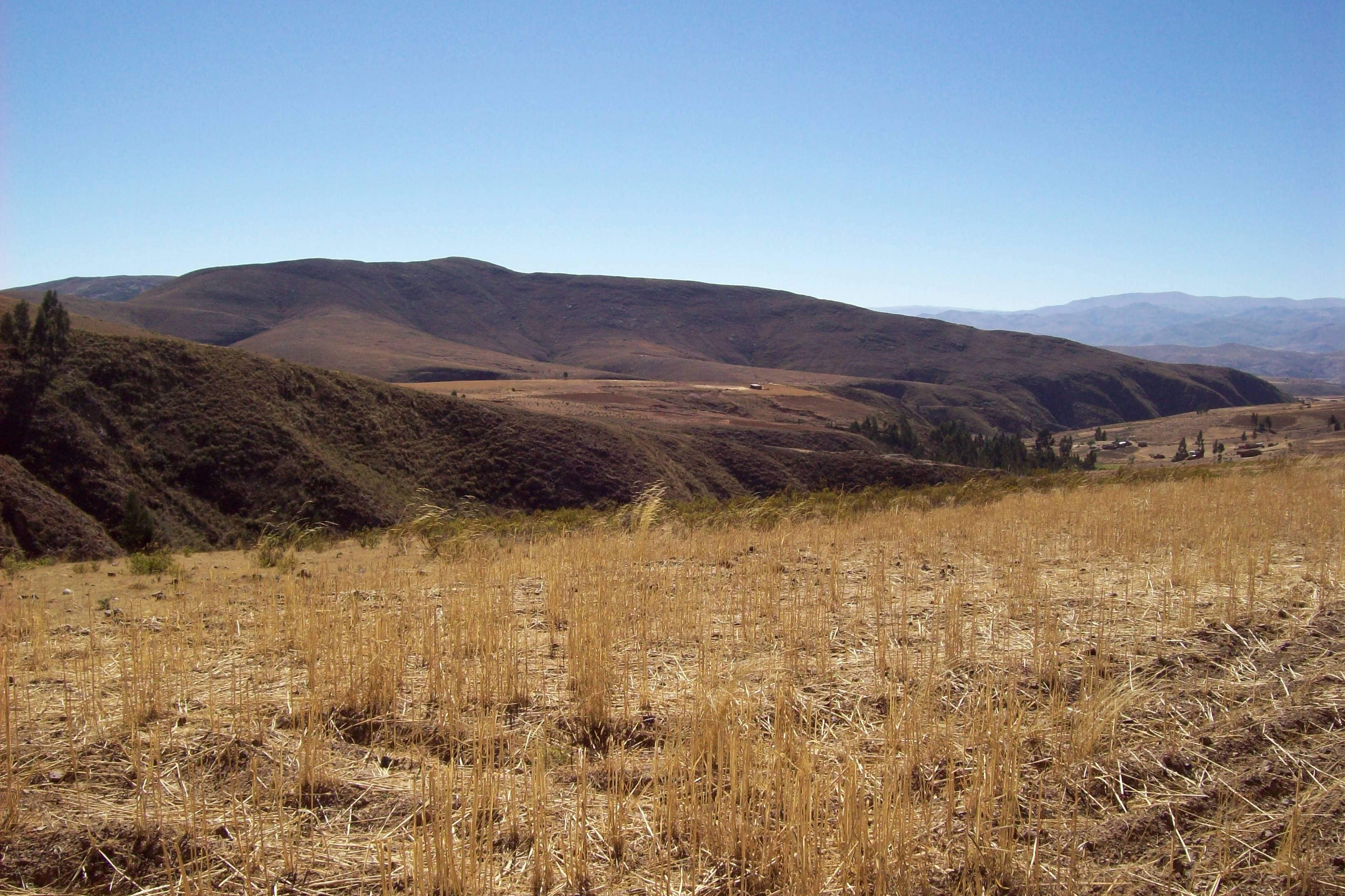 Agriculture in Bolivia.